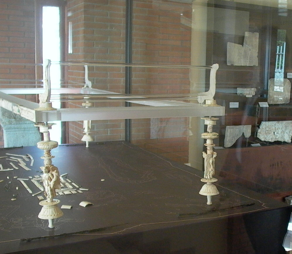 Letto in osso rinvenuto dalla necropoli Aquinum e conservato nel Museo Archeologico Nazionale G. Carettoni di Cassino